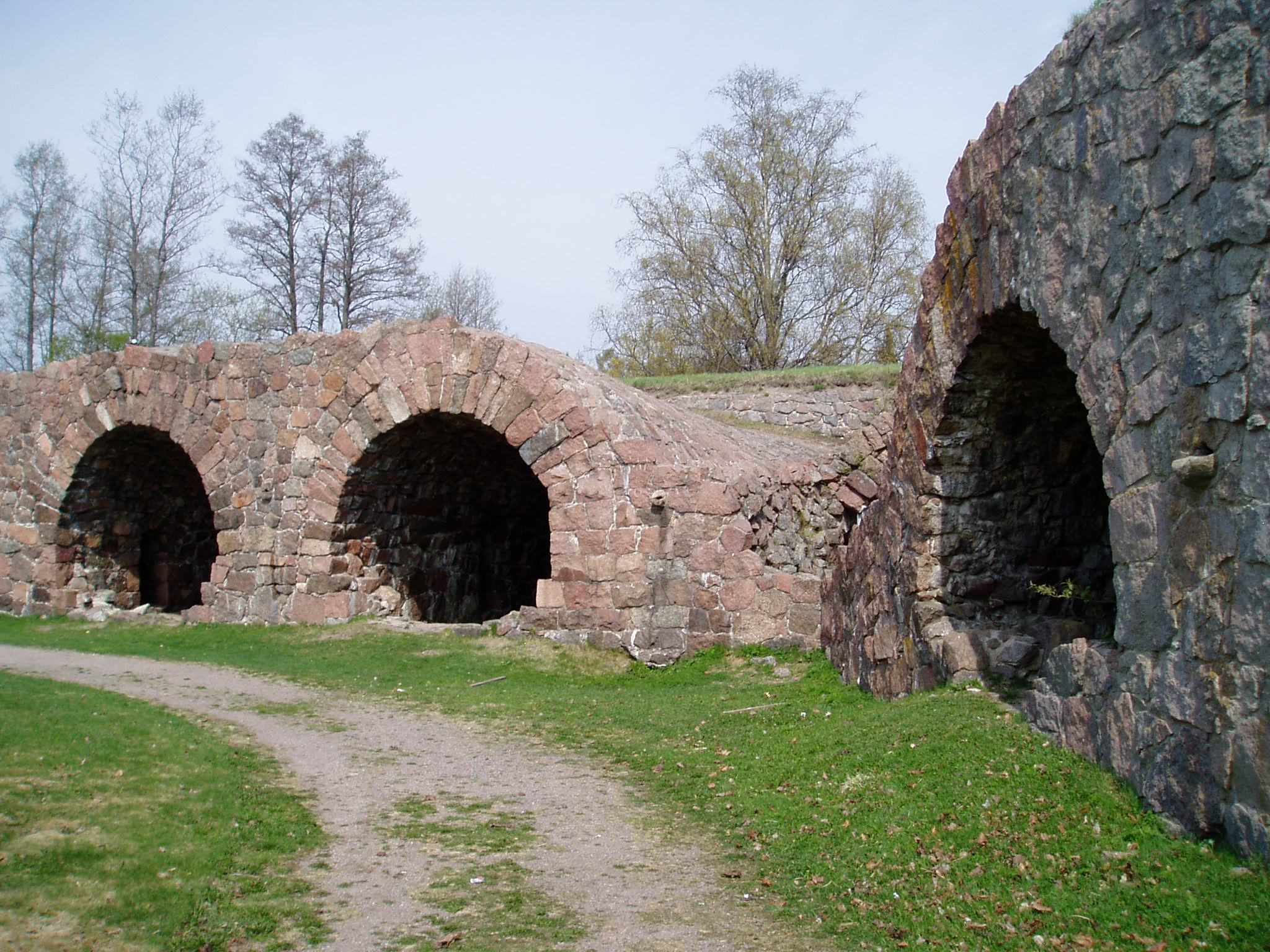 Loviisan linnoitukseen kuuluvan bastioni Ungernin tykkikasematteja. Foto: Ohto Kokko